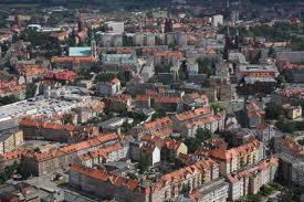 Centrum Legnicy.